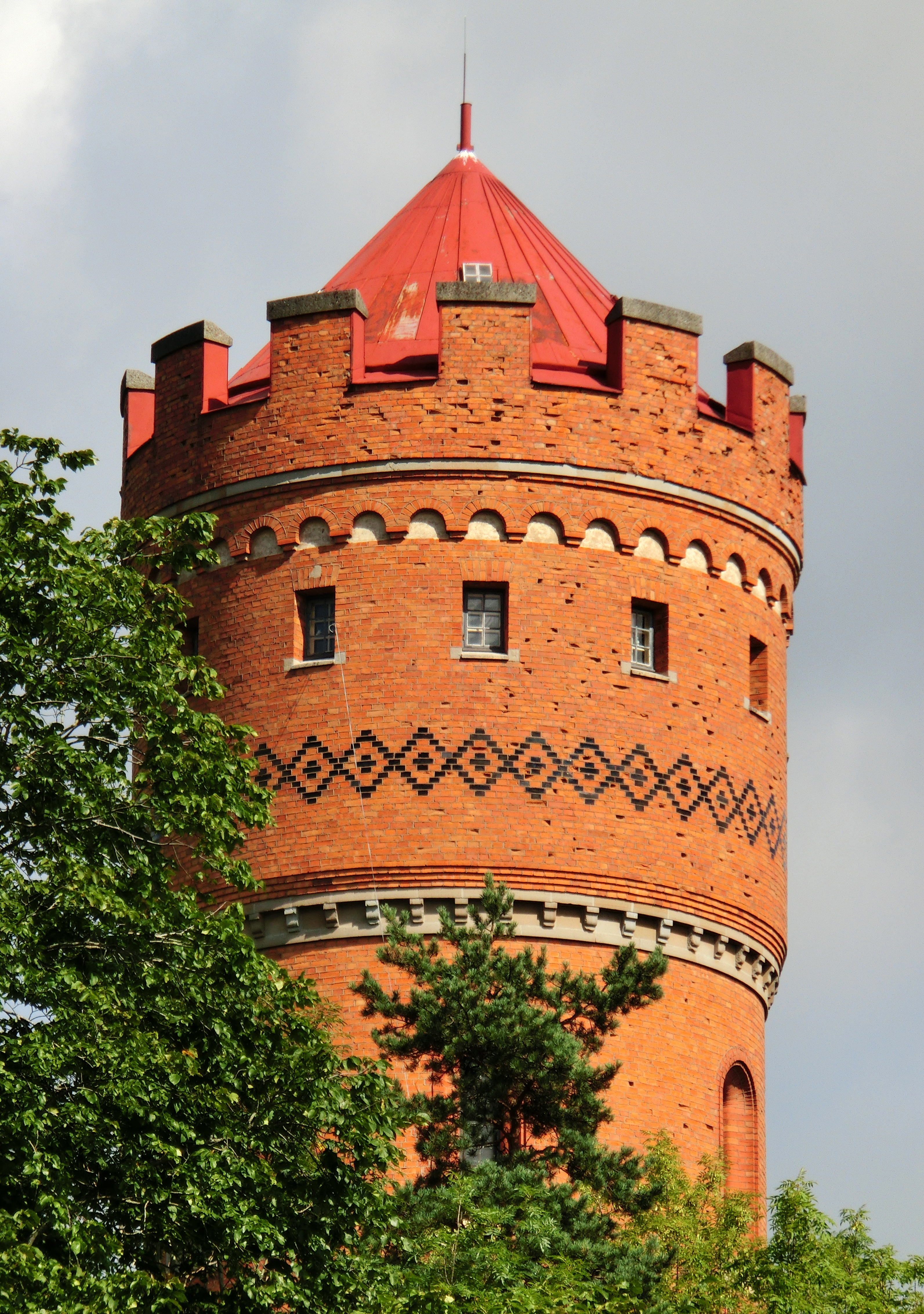 Gamla vattentornet byggt 1903 i Sala, Sala kommun, Västmanlands län, Västmanland, Sverige.